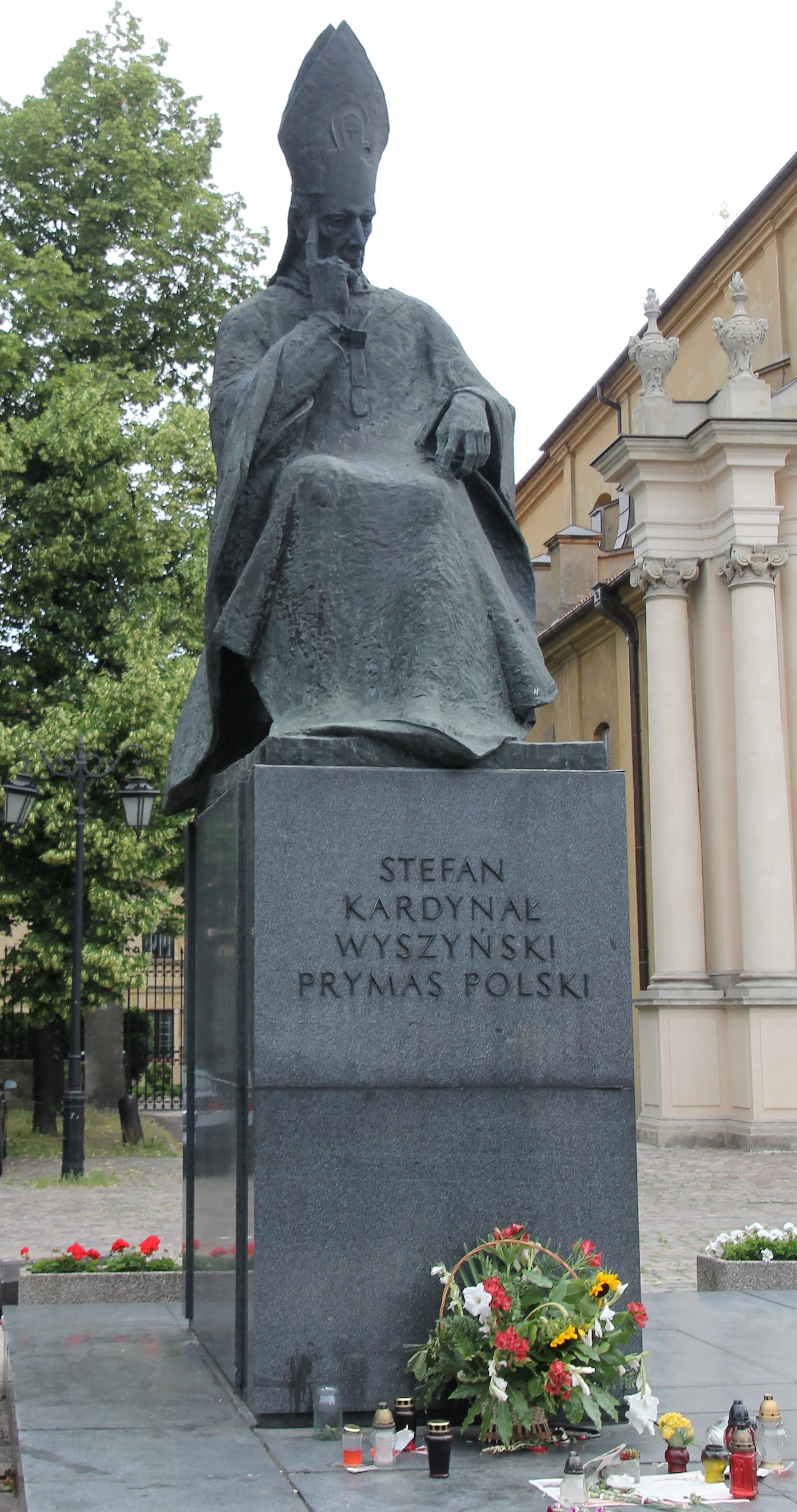 Denkmal Stefan Kardinal Wyszynski, Warschau